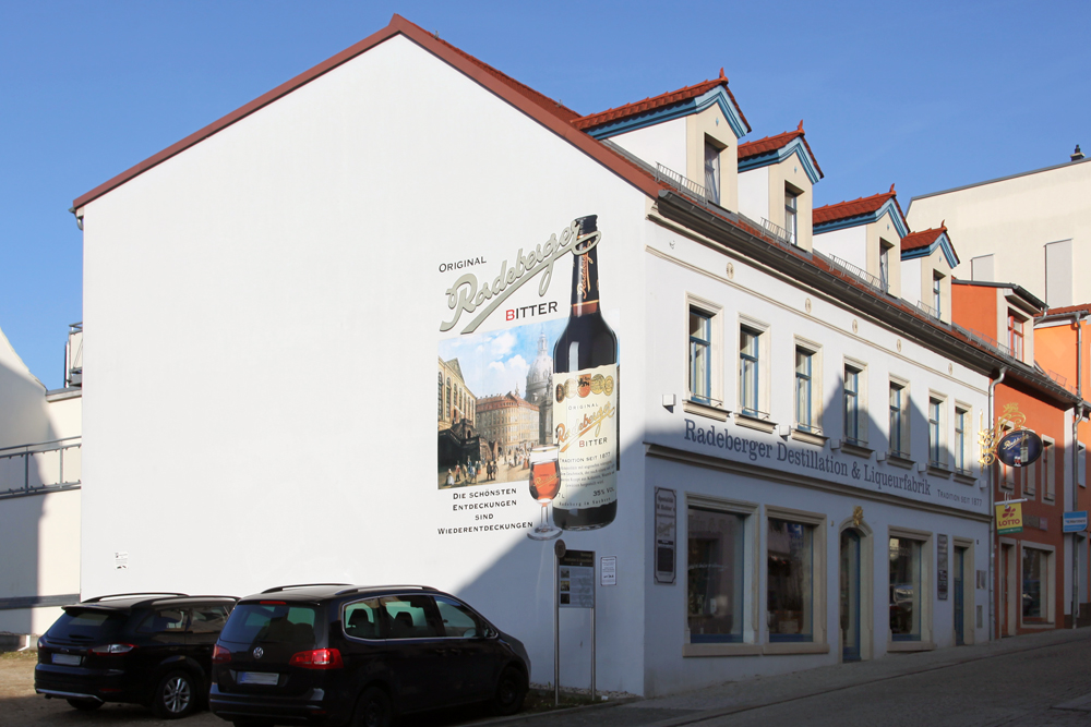 Stammhaus der Radeberger Destillation & Likörfabrik GmbH mit Reklame für Radeberger Bitter